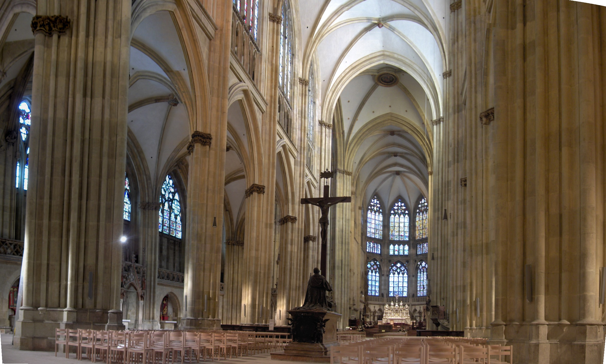 Innenraum des Doms St. Peter